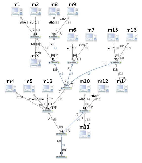 Imagen de Marionnet simulando una red compleja.